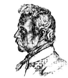 Johann Daniel Böhm (1794-1765) Bildhauer und Medailleur